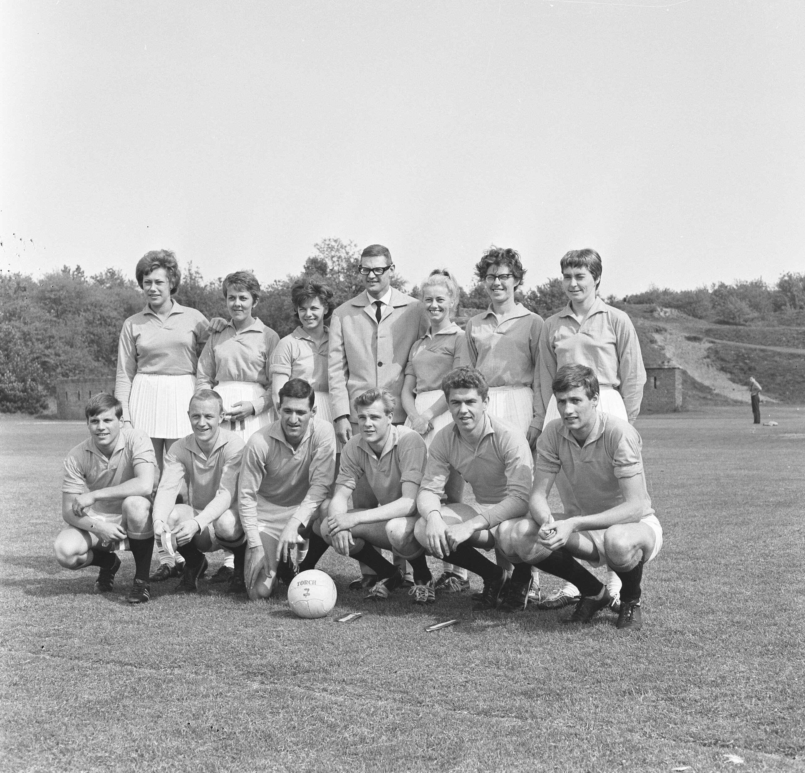 Collectie / Archief : Fotocollectie Anefo Reportage / Serie : [ onbekend ] Beschrijving : Nederland tegen Belgie 8-2, korfbal het Nederland twaalftal Datum : 23 mei 1965 Trefwoorden : KORFBAL Fotograaf : Kroon, Ron / Anefo Auteursrechthebbende : Nationaal Archief Materiaalsoort : Negatief (zwart/wit) Nummer archiefinventaris : bekijk toegang 2.24.01.03 Bestanddeelnummer : 917-8011